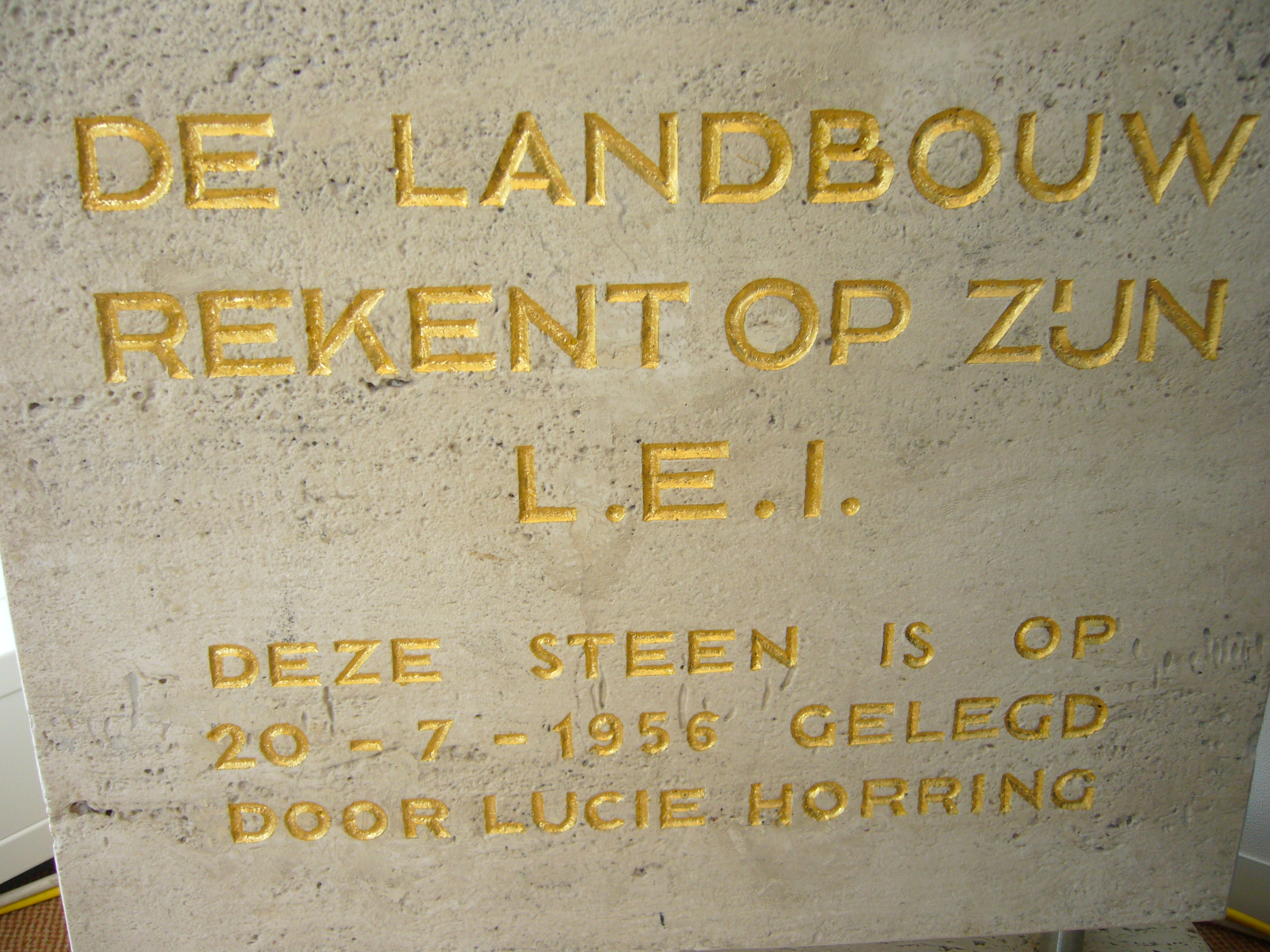 Landbouw Econ. Instituut, eerste steen gelegd bij kantoor Conradkade in 1976